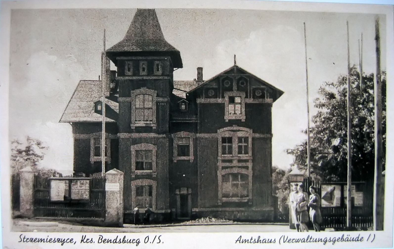 Siedziba Urzędu Gminy,ok. 1942 r.,Dąbrowa Górnicza